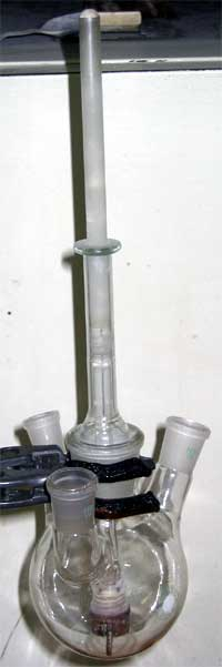 Mieszadło mechaniczne KPG - zdjęcie własne